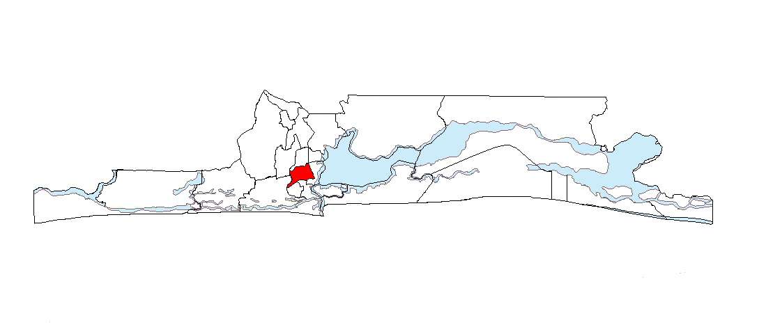 Ubicación de Surulere en el Estado de Lagos